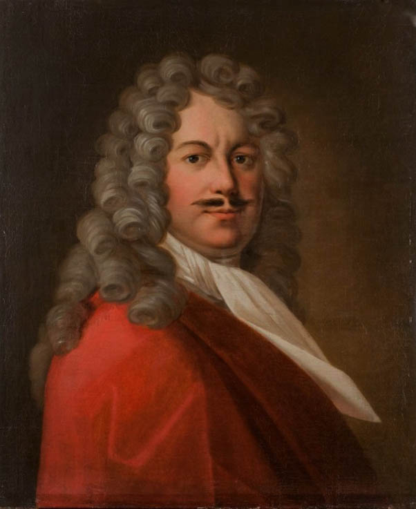 Prince Andrey Yakovlevich Khilkov (1676-1718)